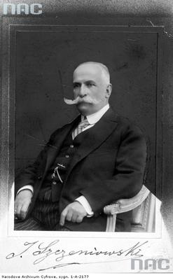 Ignacy Szczeniowski (1853-1932) – polski minister przemysłu i handlu w 1919.